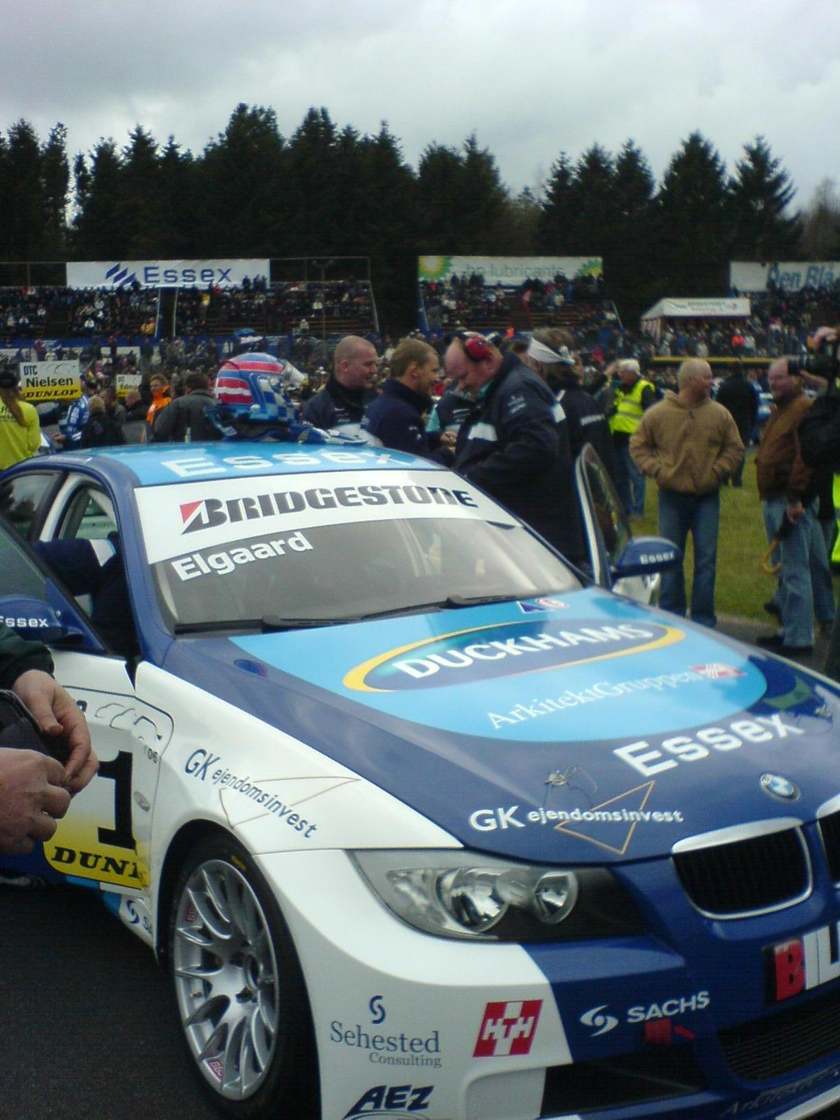 Casper Elgaards racerbil